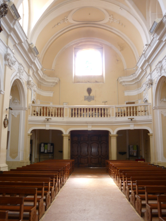 San Giovanni in Fiore - Chiesa Madre, coro e finestrone centrale